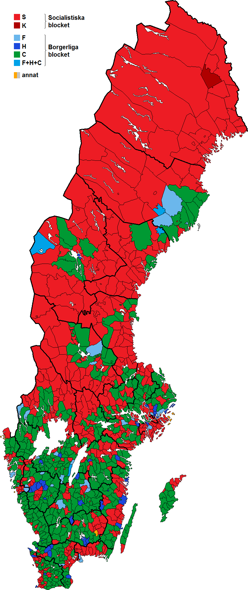 Största parti inom det ledande blocket i samtliga 1 006 kommuners kommun- och stadsfullmäktige efter kommunalvalet 1962. I kommuner där blocken fick lika många mandat ha röstetal avgjort färgen. Partier som inte ingår i något av de politiska blocken räknas som egna block, och redovisas med brandgul färg. Grå färg används för Holmöns landskommun där inget av de etablerade partierna hamnade i kommunfullmäktige.